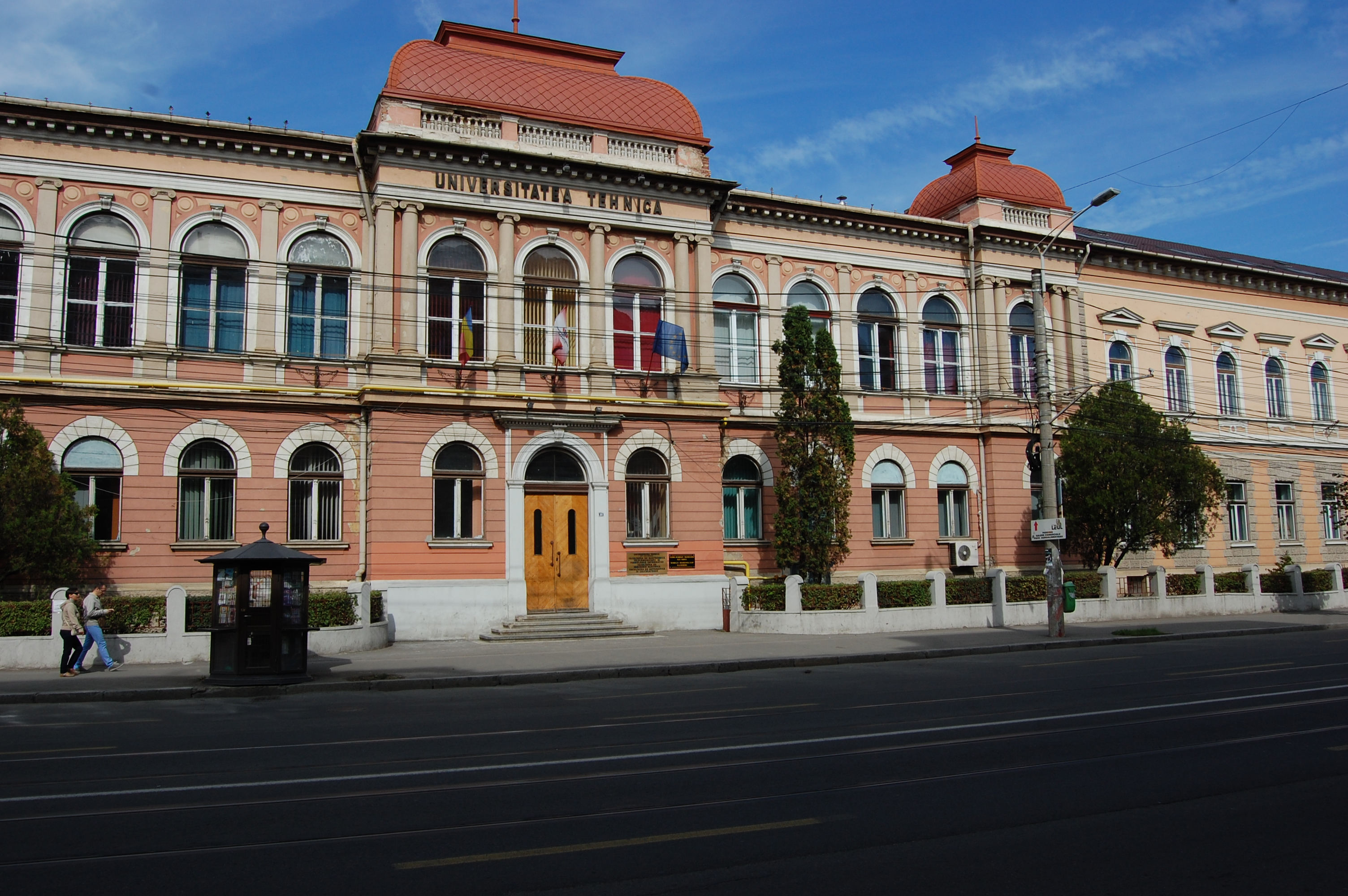 Institutul Politehnic